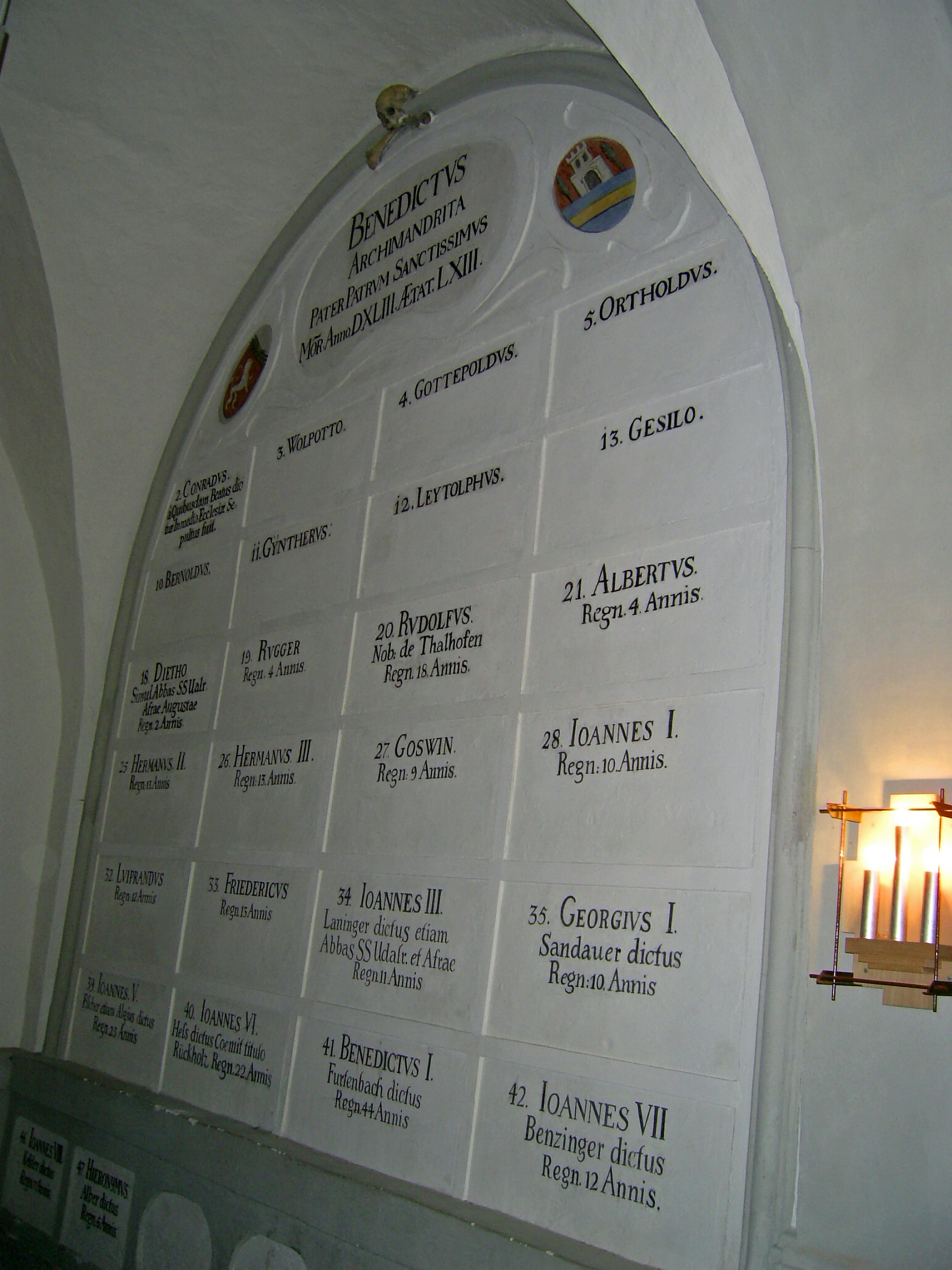 Äbte Liste St Mang Krypte 1